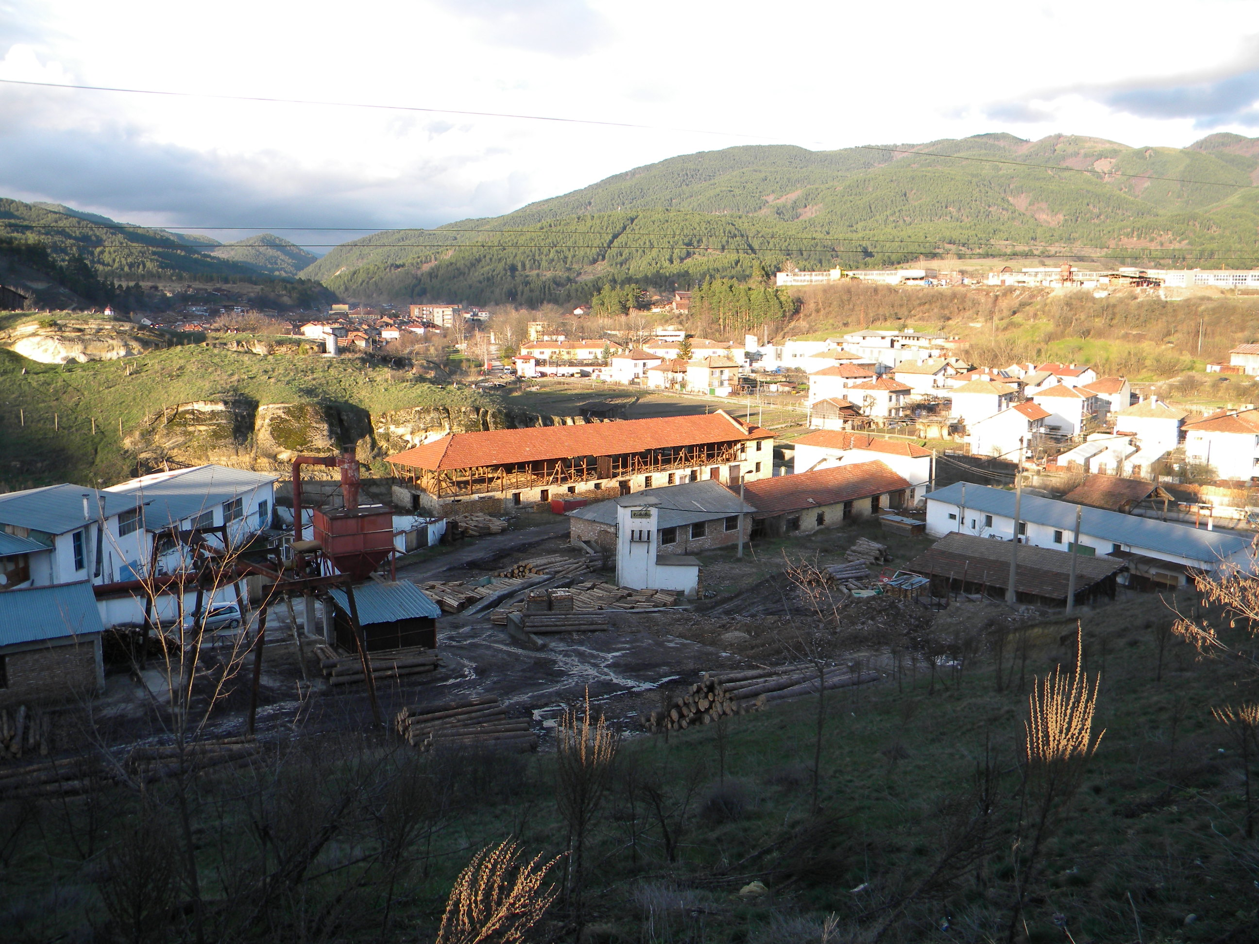 село Елешница